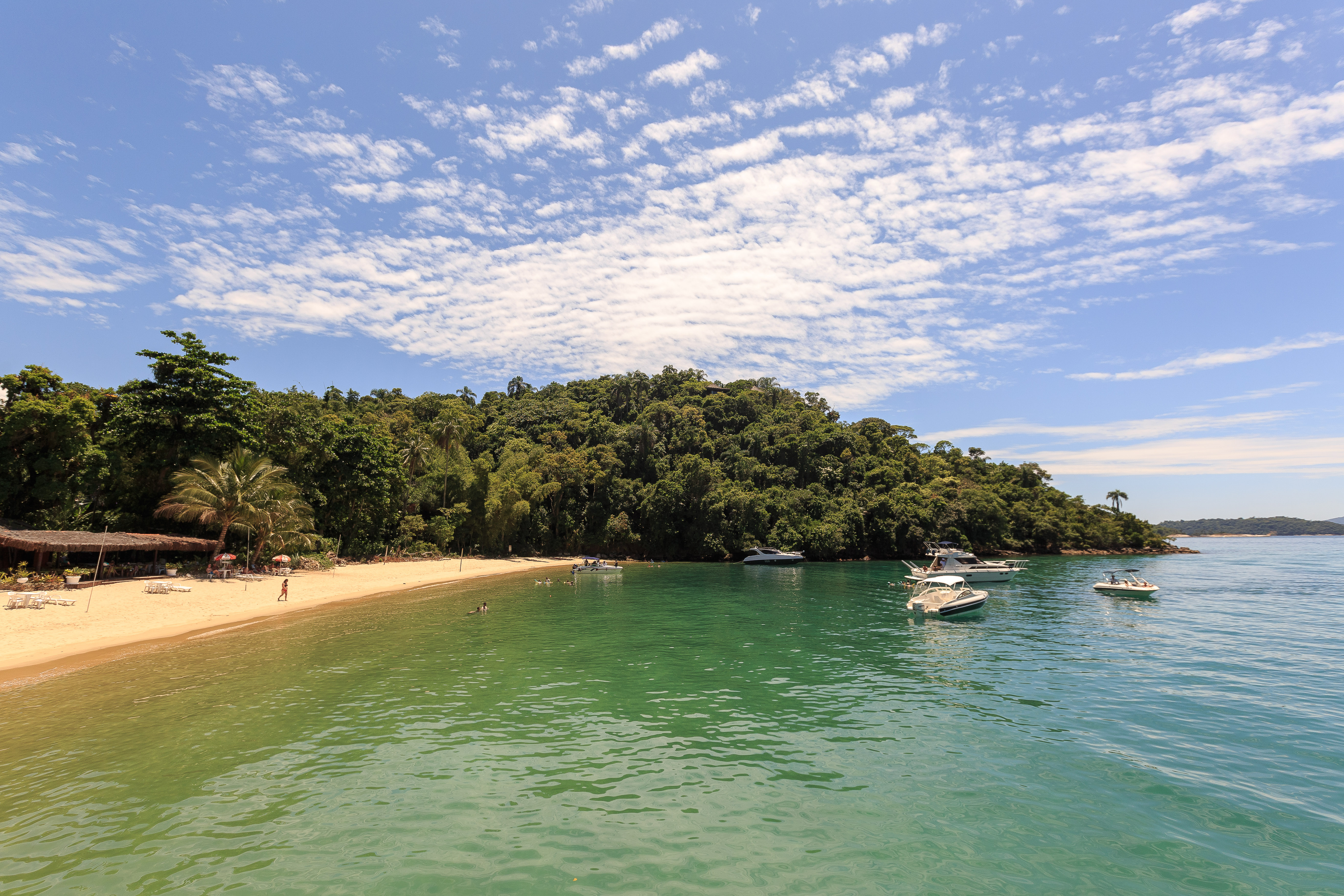 Ilha da Gipóia localizada na cidade de Angra dos Reis